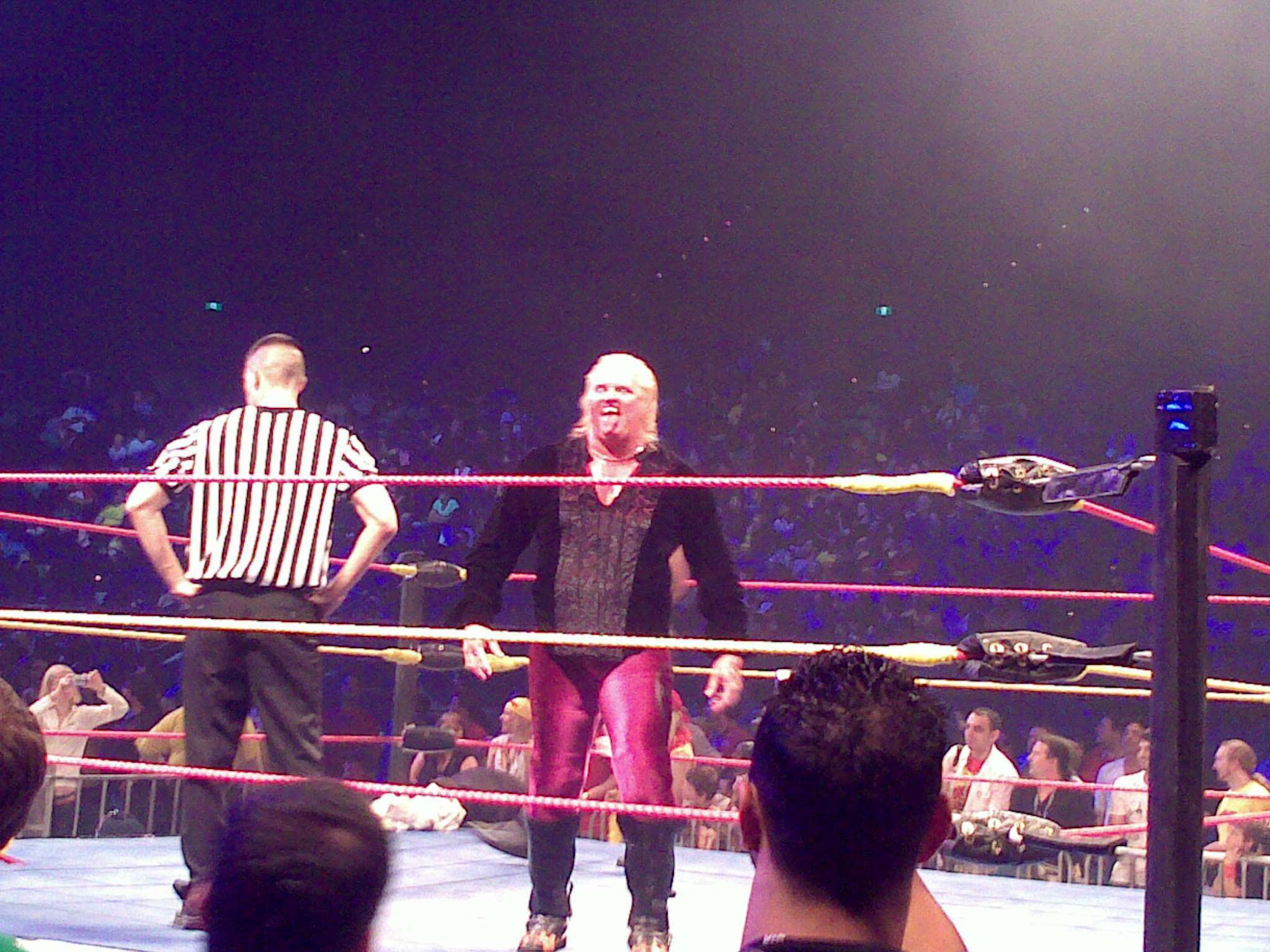 wrestler vampire gangrel